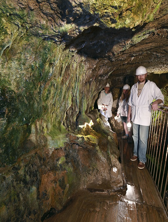 Štola sv. Jiří, Kutná Hora.